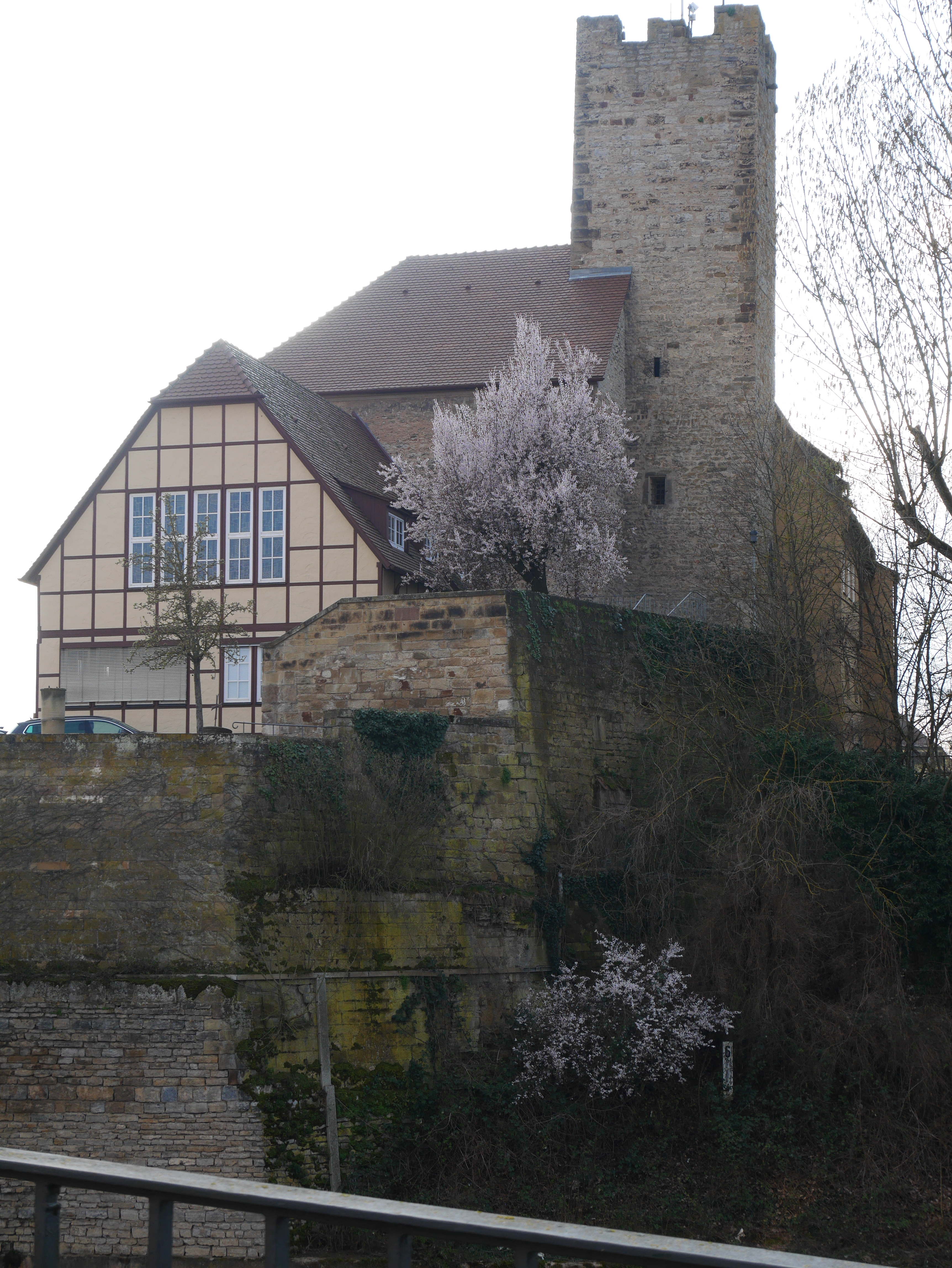 Grafenburg (Lauffen am Neckar) Turm Basis